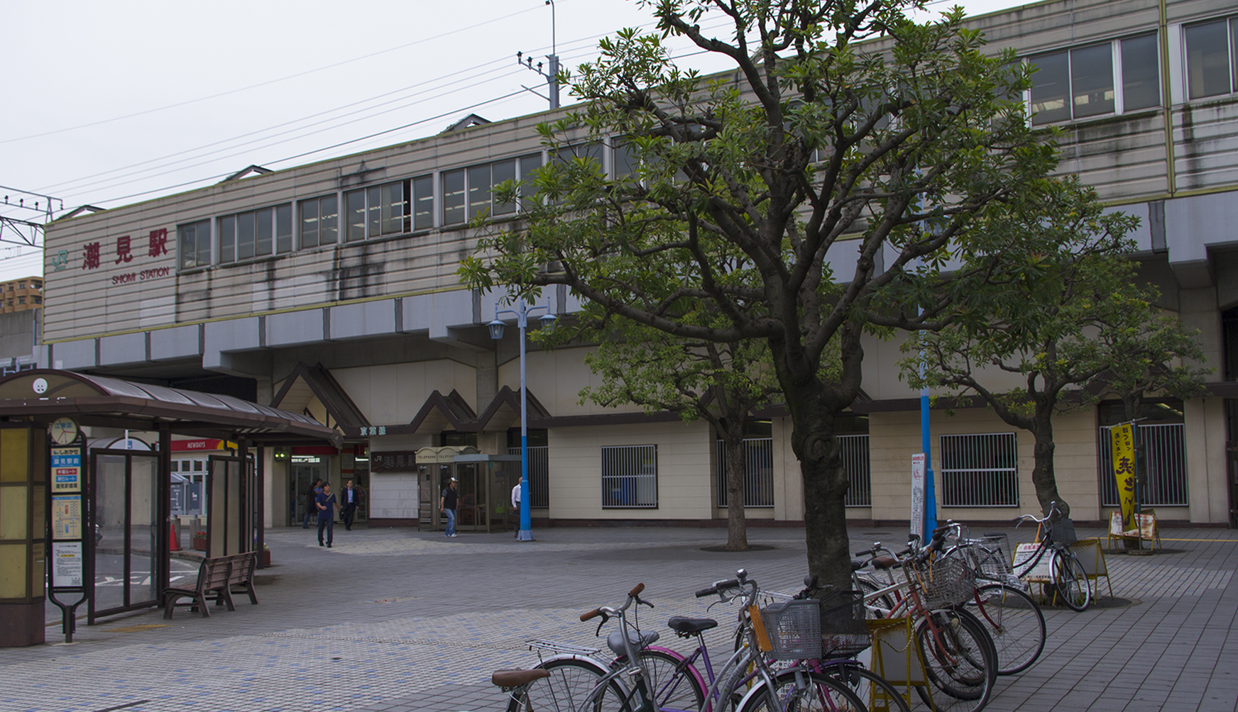 東日本旅客鉄道株式会社京葉線潮見駅